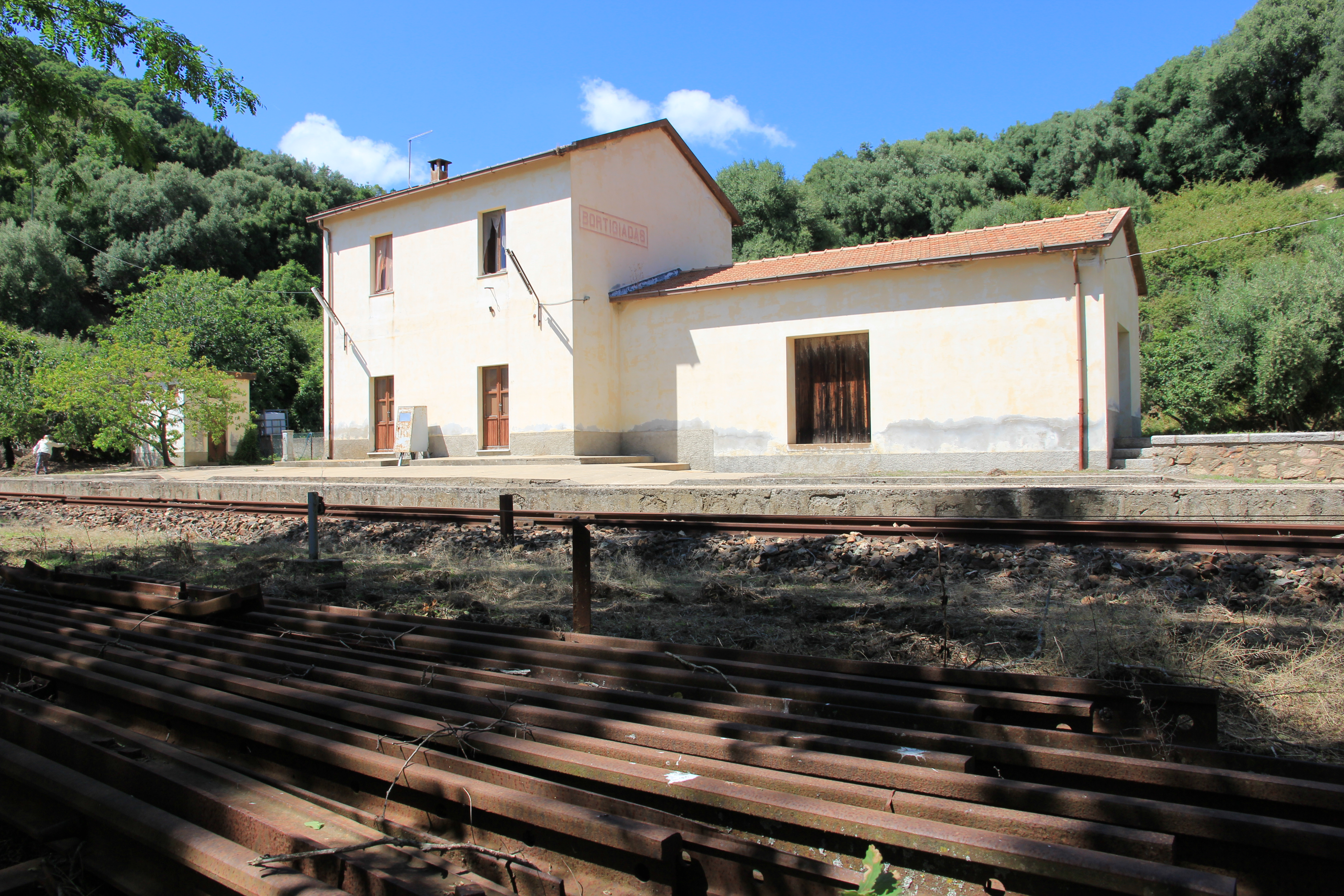 Bortigiadas - Stazione ARST (ex Ferrovie della Sardegna)